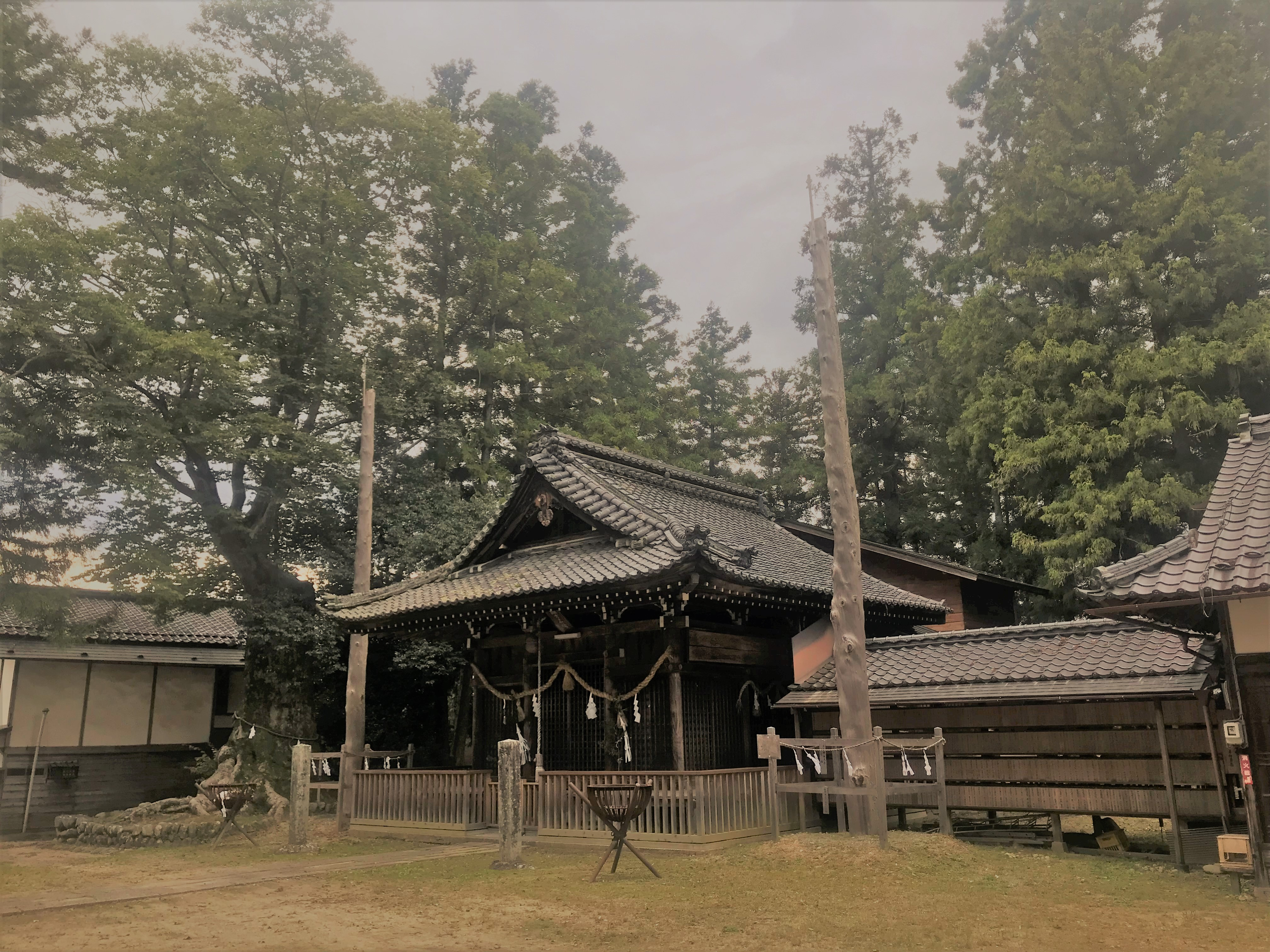 竜東地区ではもっとも格式のある諏訪神社です。御柱祭りは７年に一度行われます。